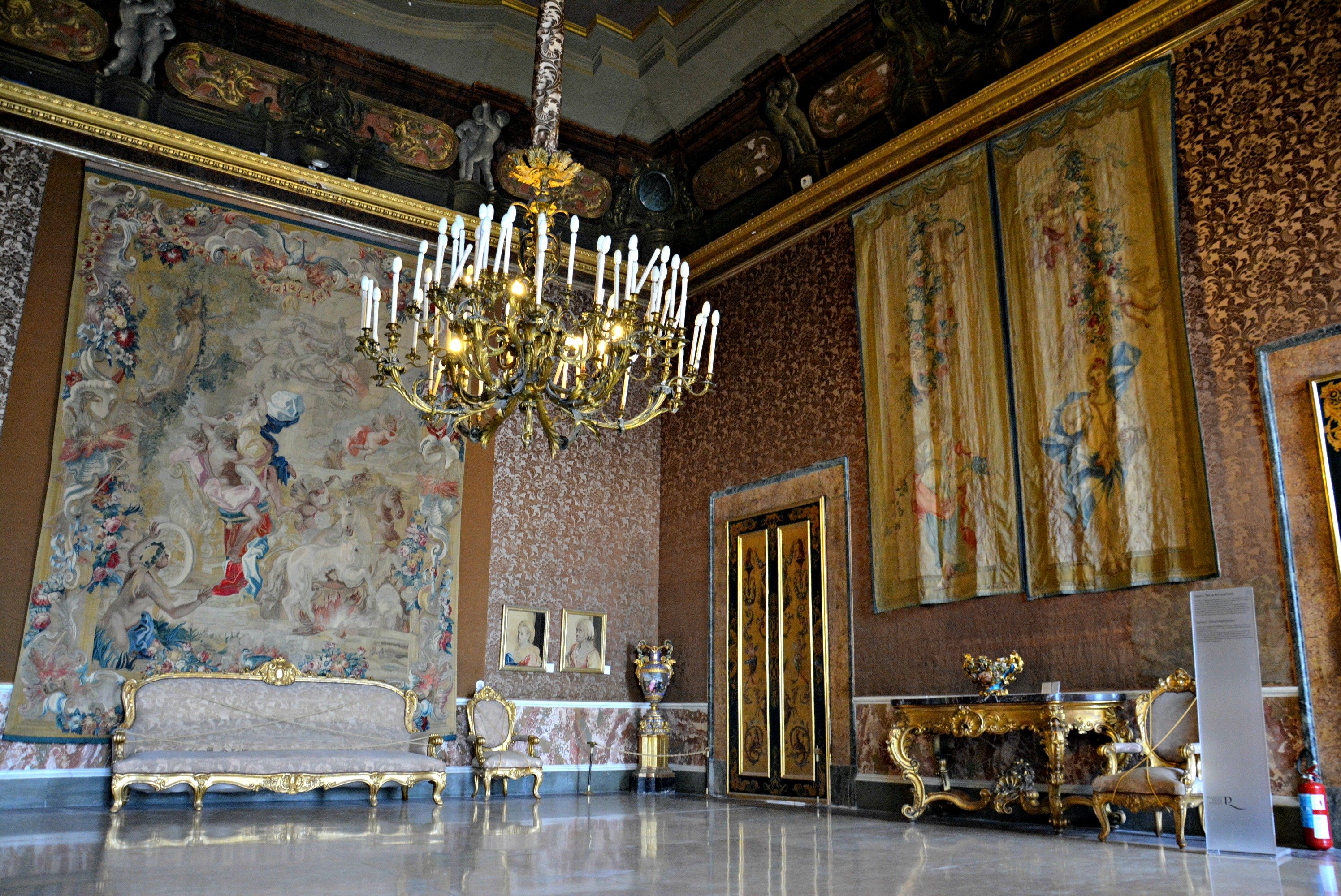 Vedi titolo